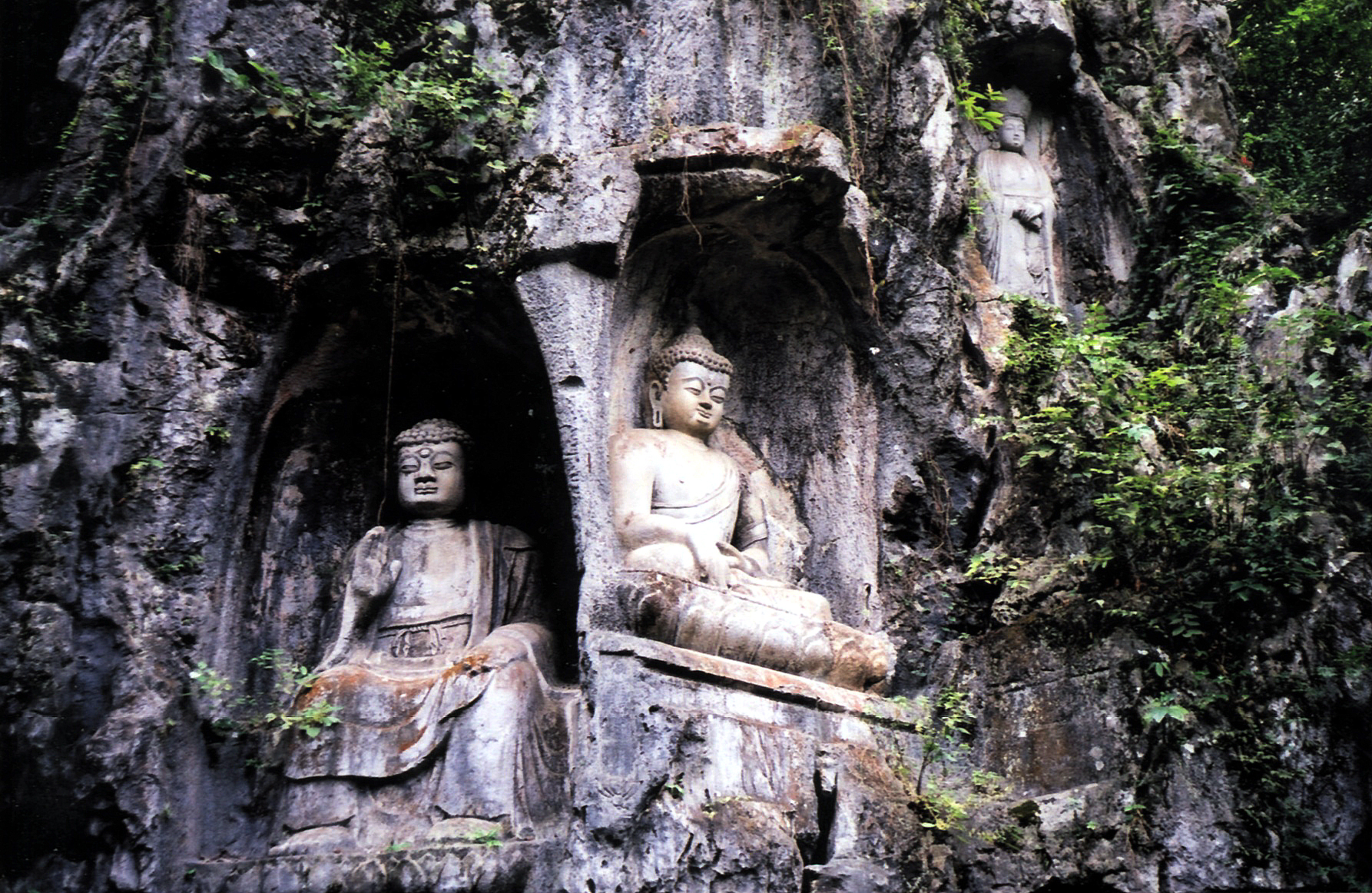 Feilai Feng grottos